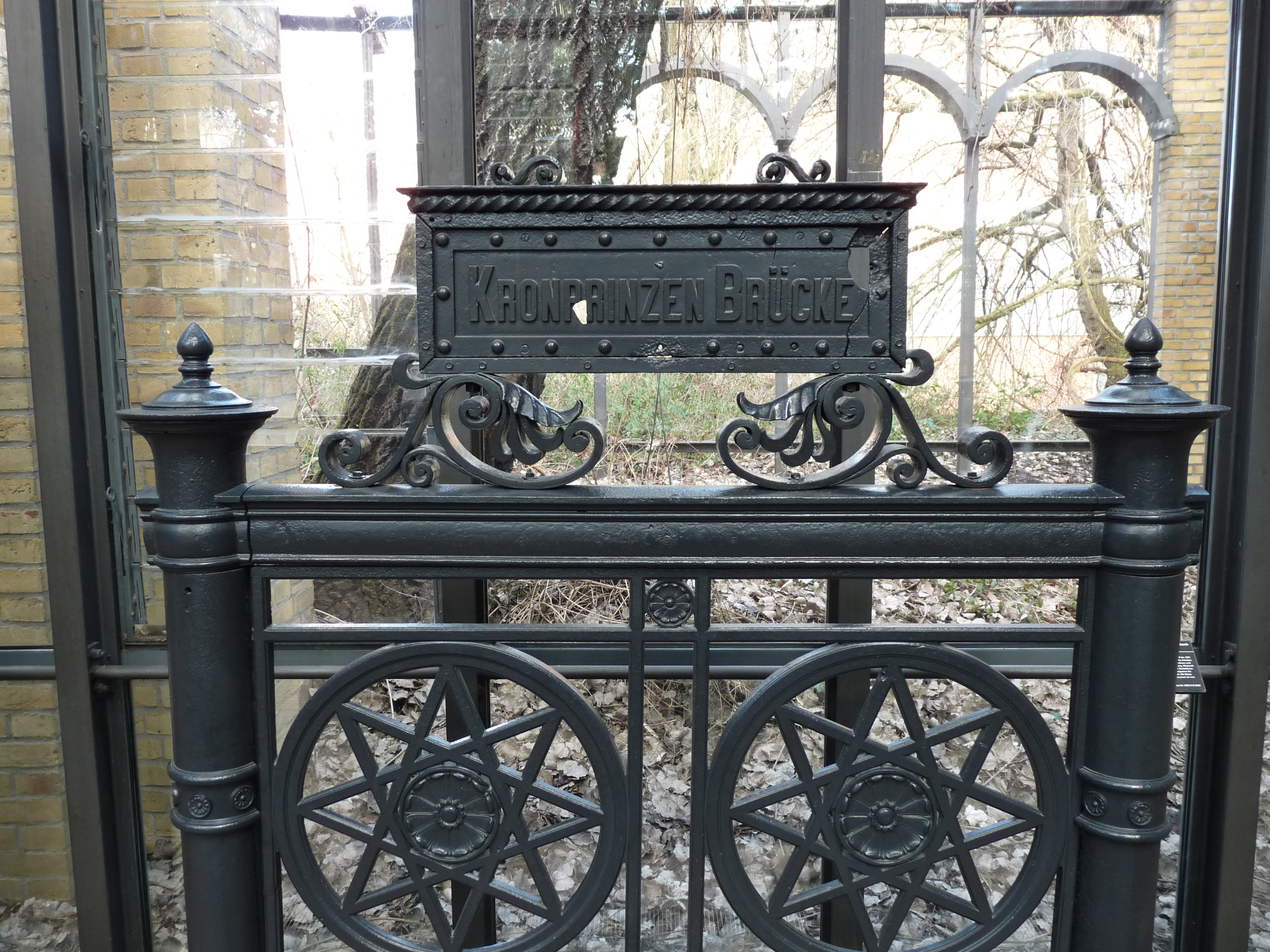 Teil des Geländers der früheren Kronprinzenbrücke über die Spree in Berlin im Technikmuseum in Berlin.